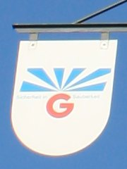 Walldorf, Baden-Württemberg: Wappenbaum an der Hauptstraße: Innungswappen der Gebäudereiniger